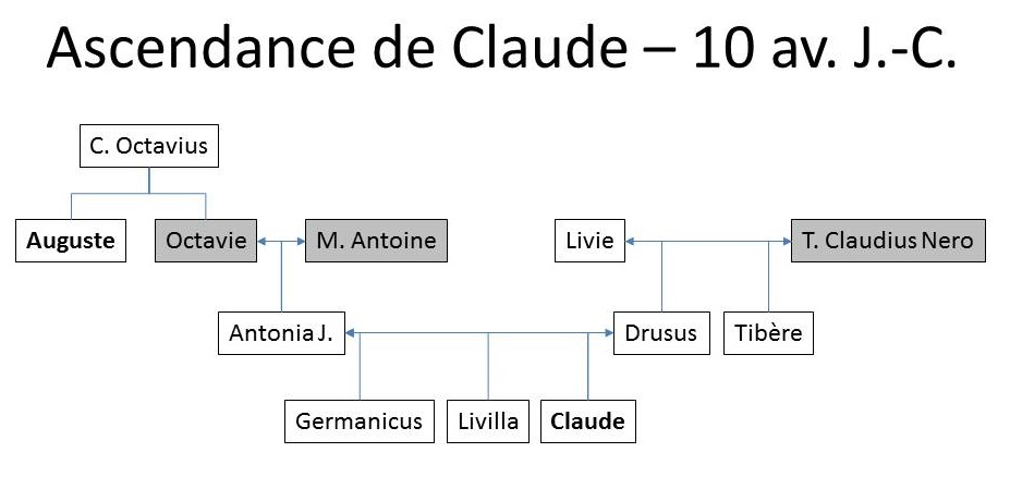 Ascendance de Claude à sa naissance en 10 av. J.-C.. En grisé, personnages décédés à cette date